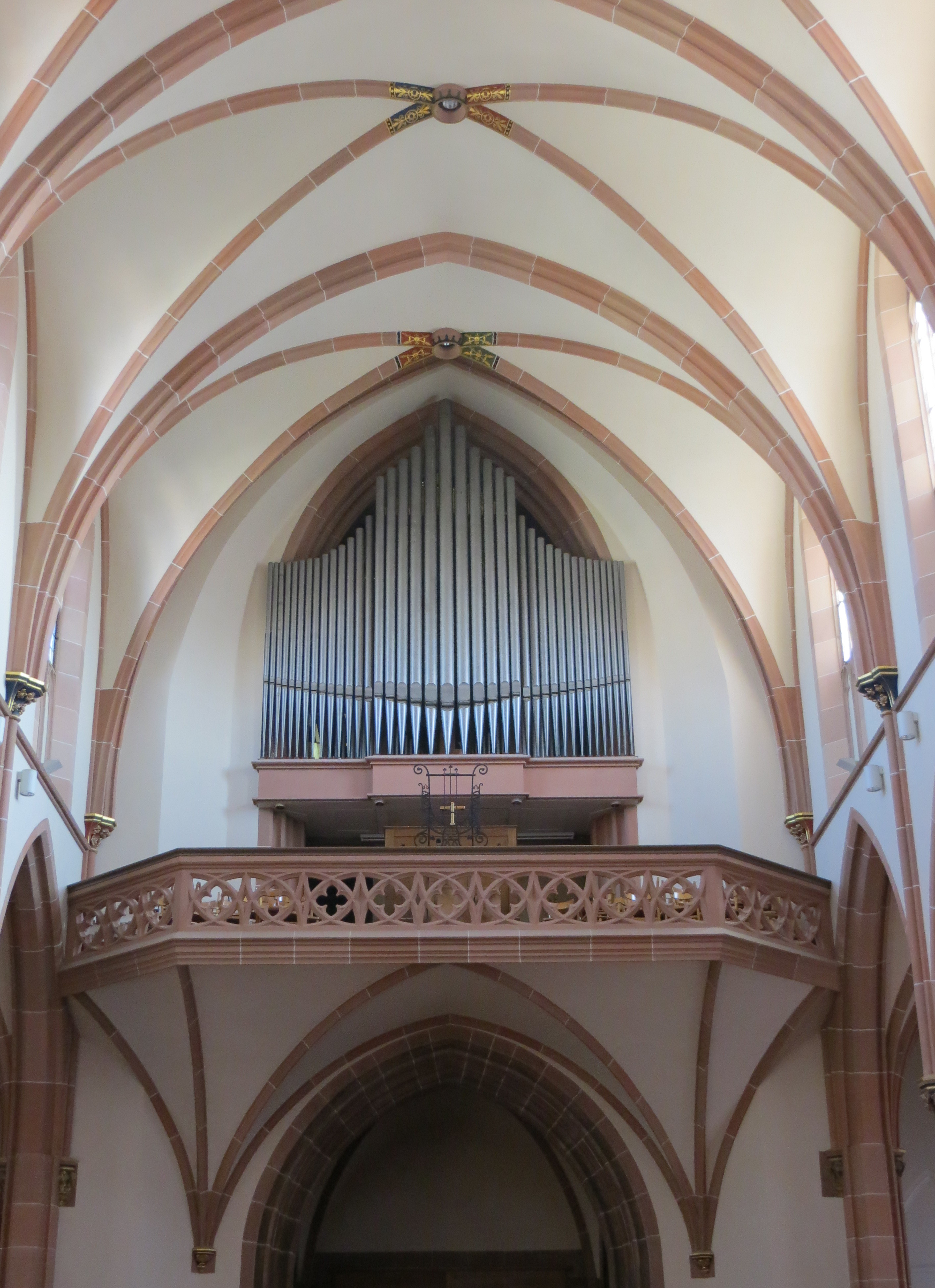 Hauptorgel St. Peter & Paul (Bühl), Wilhelm Schwarz & Sohn Überlingen